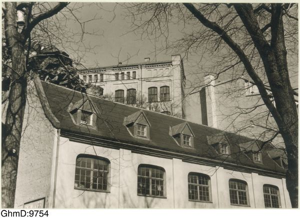 Kvarnbergsskolan sedd från Kronhusparken, Bildsamlingen vid Göteborgs stadsmuseum. GhmD-9754